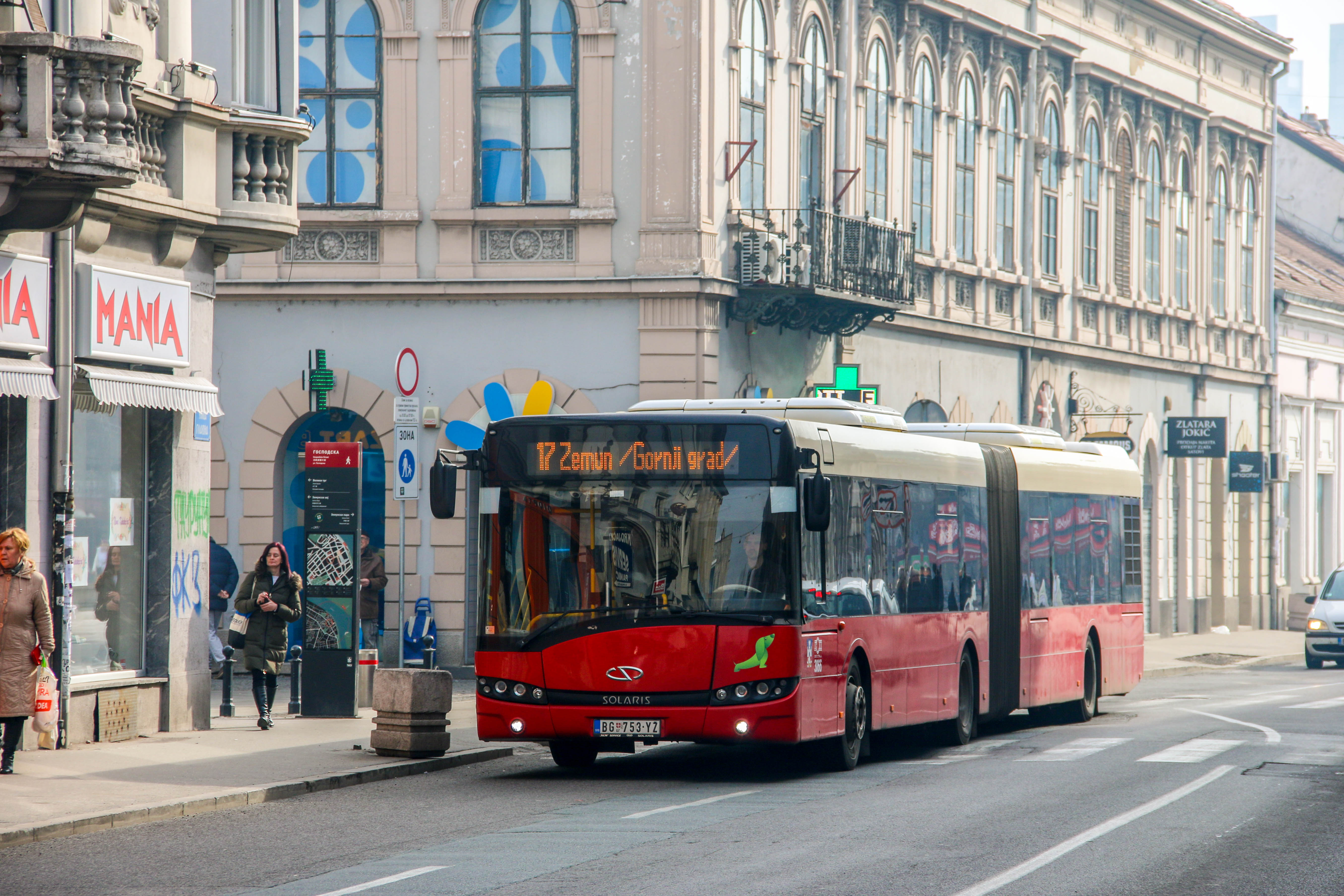 Solaris